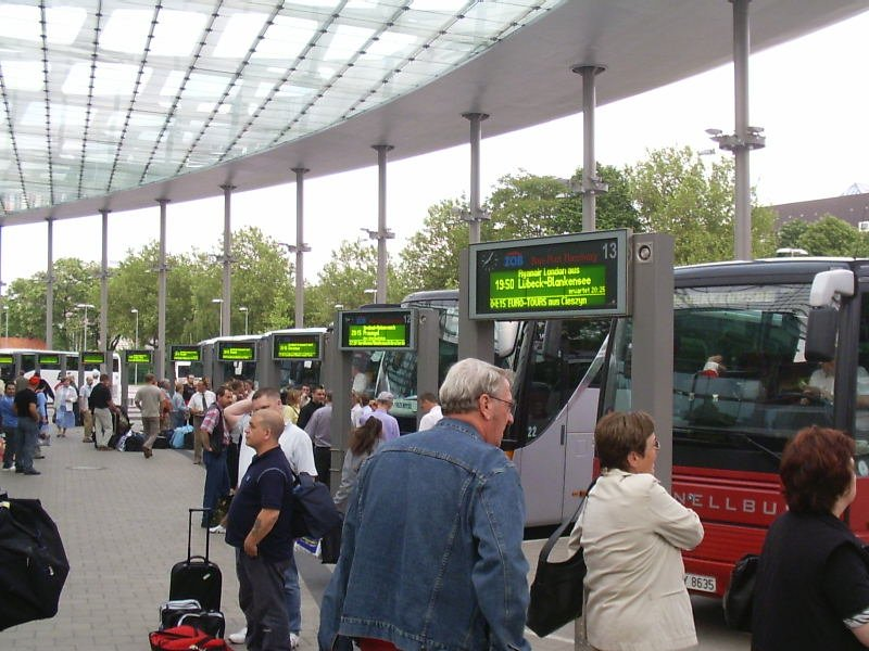 Bussteig auf dem Zentralen Omnibus-Bahnhof in Hamburg-St. Georg.